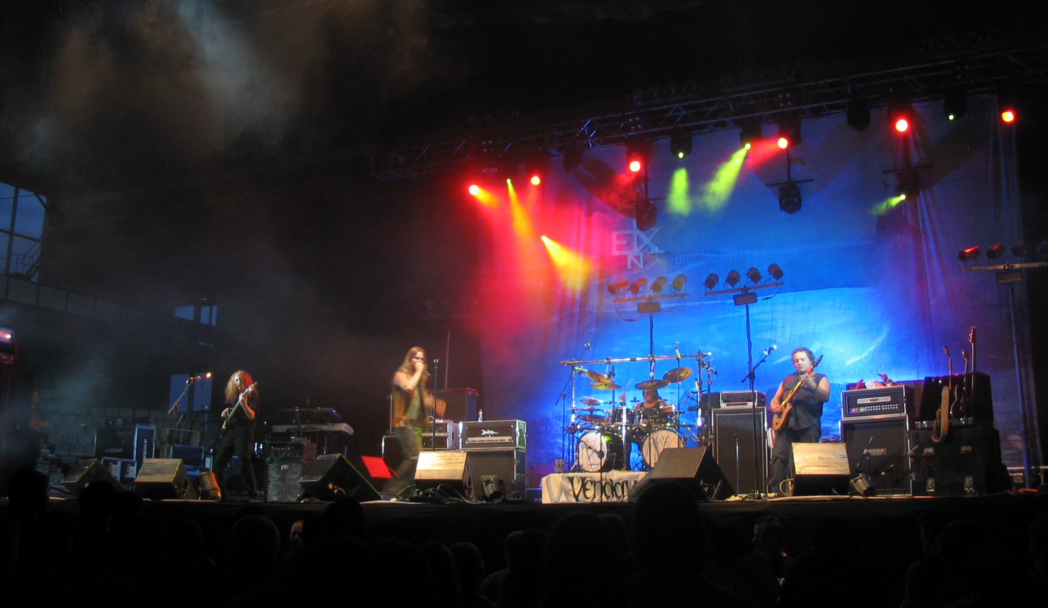 Vendaval en Gijon Metal Fest en 2006, en el Palacio de Deportes Presidente Adolfo Suárez. El festival estaba compuesto por Vendaval, Avalanch e In Extremo.